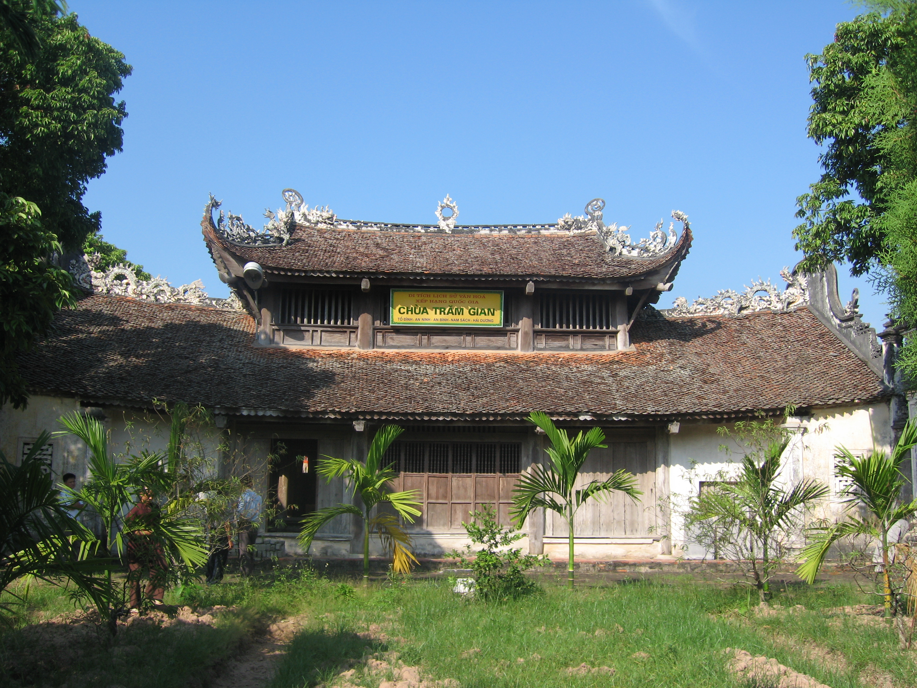 Hình tự chụp bởi Casablanca1911